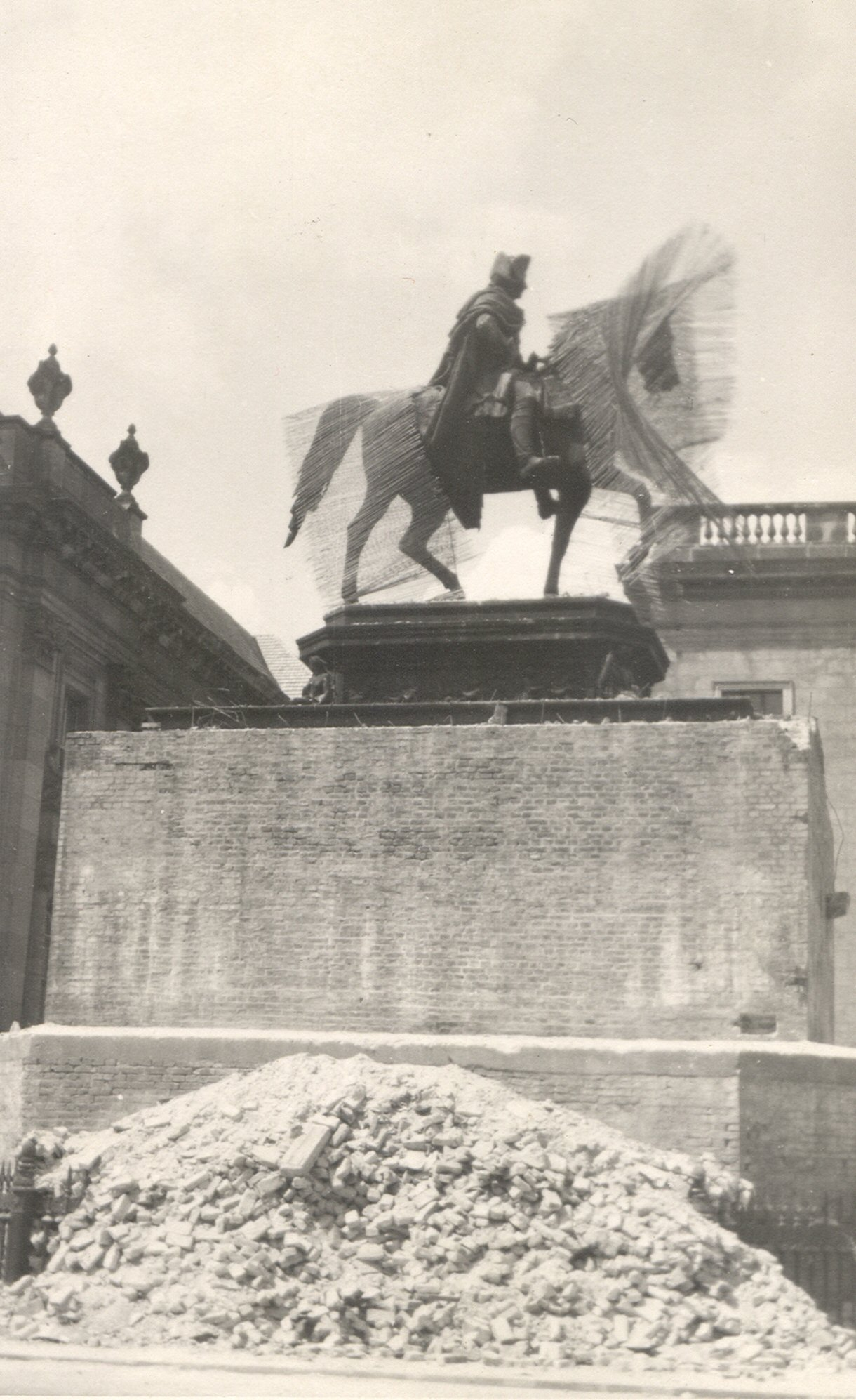 Abbruch der Schutzummauerung beim Berliner Reiterstandbild des Alten Fritz